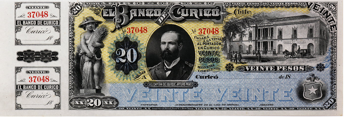 Banco de Curico